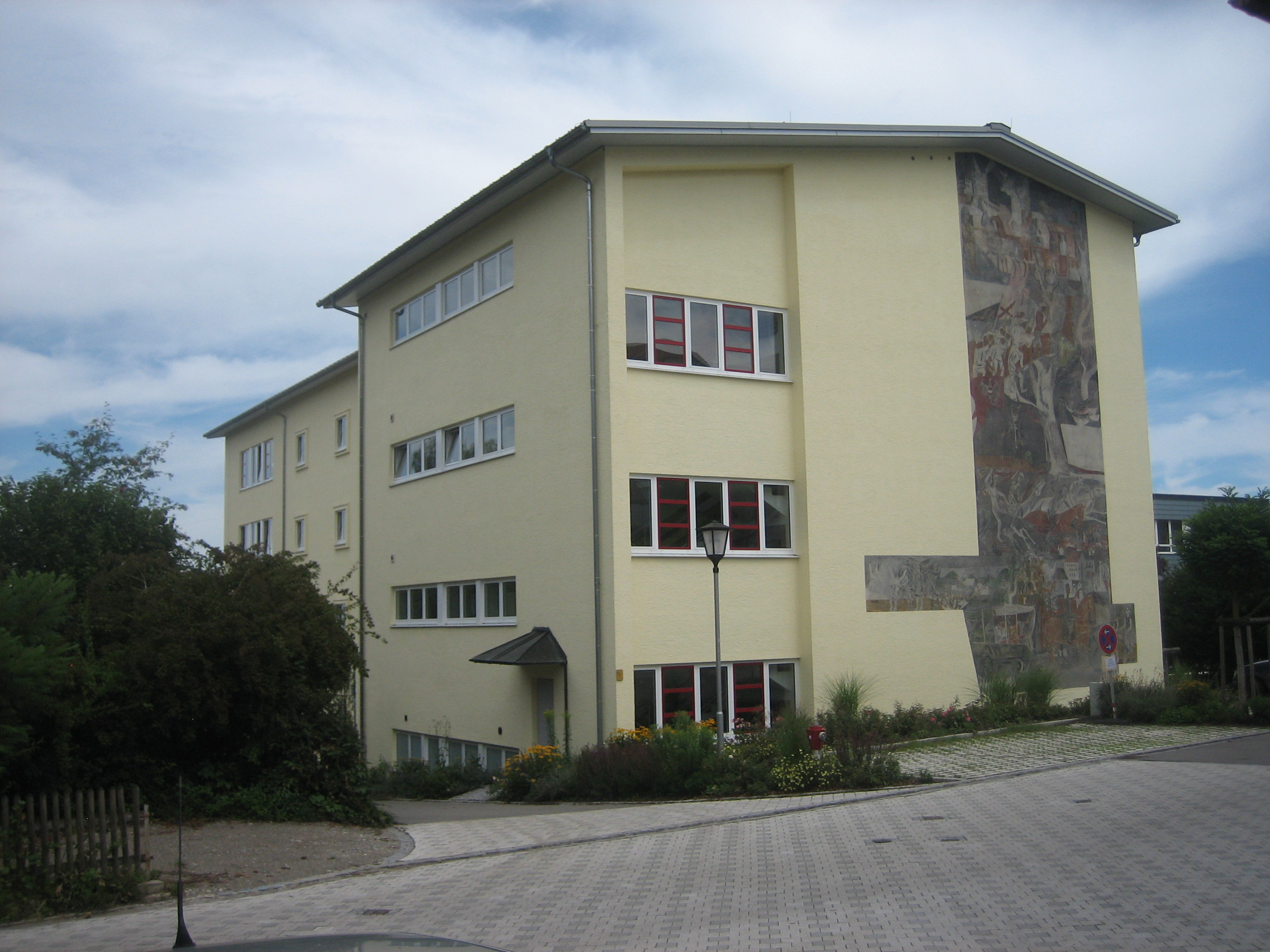 Sebastian-Kneipp-Volksschule, Bad Grönenbach, Landkreis Unterallgäu, Bayern